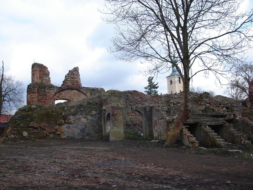 Zespół pałacowy - folwark dolny. Obecnie w fazie konserwacji ruiny.